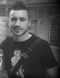 Romain Alessandrini dans les rues de Clermont-Ferrand !